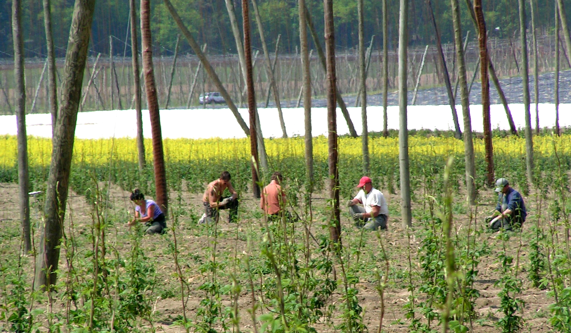 "Hopfenausputzen" im Frühjahr bei Siegenburg, Niederbayern, Hallertau. Jede einzelne Hopfenpflanze des bis zehntausend Pflanzen umfassenden Hopfengartens, erfordert jährlich mühseliges und arbeitsintensives manuelles Entfernen überflüssiger Triebe und anwickeln der verbliebenen Triebe (das "Anleiten") auf den Rankdraht.